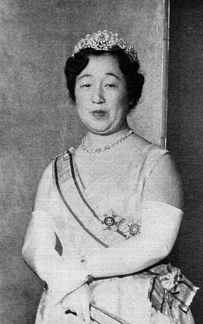 正装姿の香淳皇后